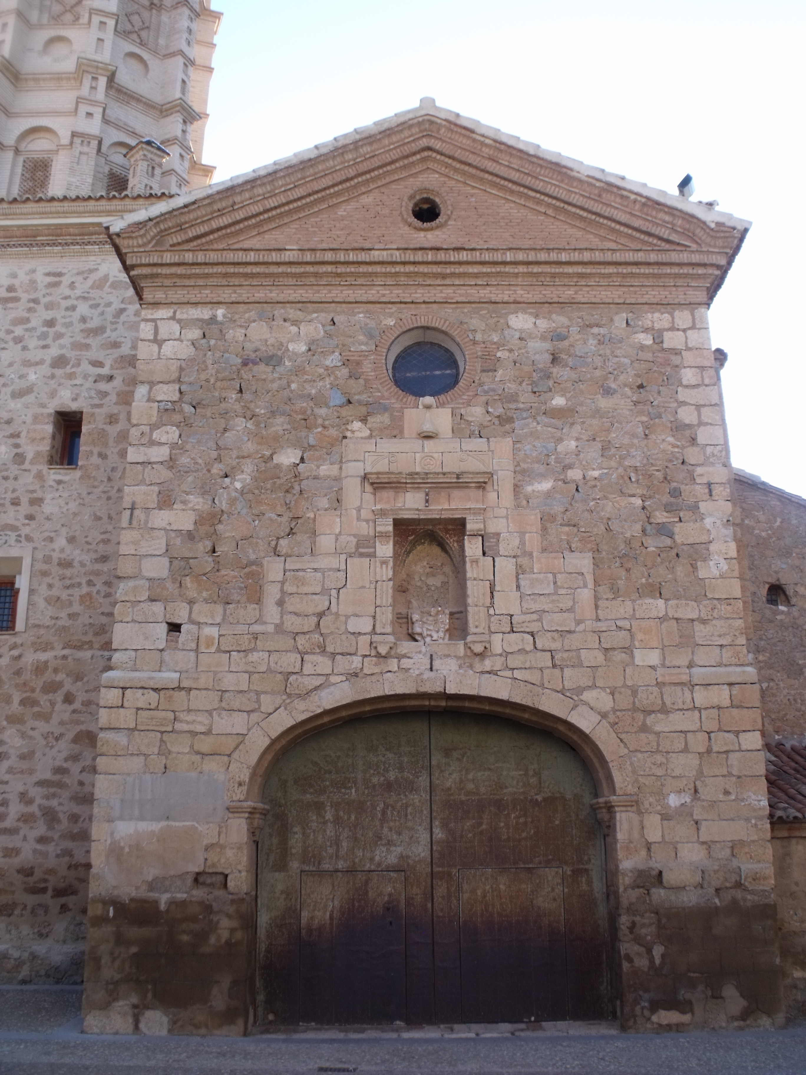 San Martín del Río